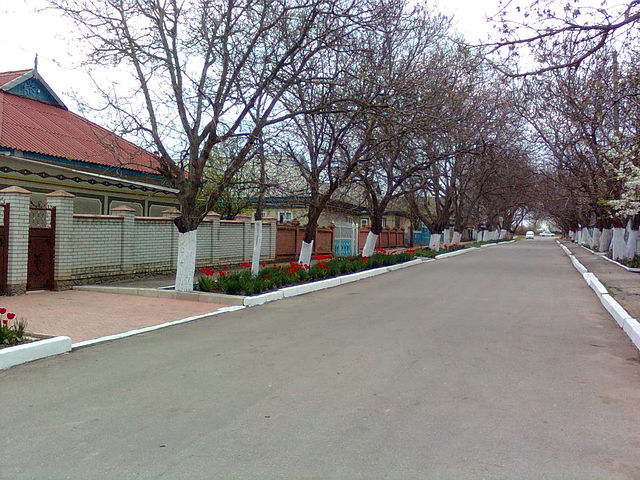 La strada che porta all'interno del paese.